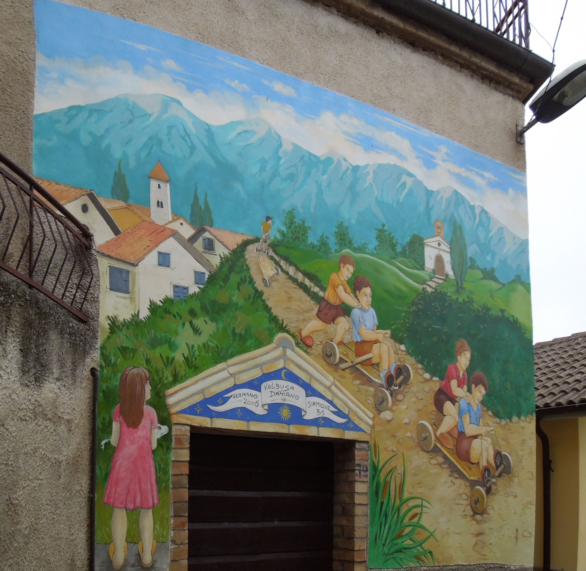 Murales del paese di Azzinano, frazione di Tossicia, in provincia di Teramo.